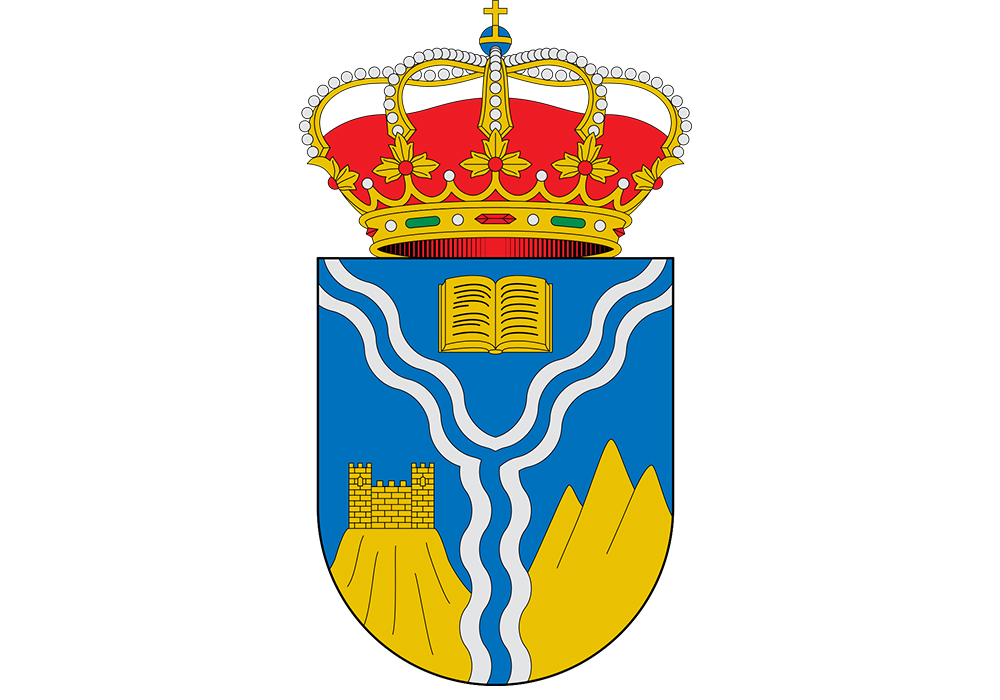 Escudo de Las Omañas